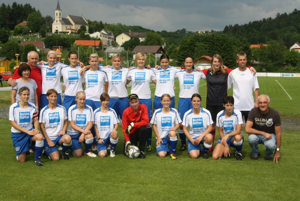 Die Mannschaft des FC Südburgenland beim Spiel gegen Neulengbach